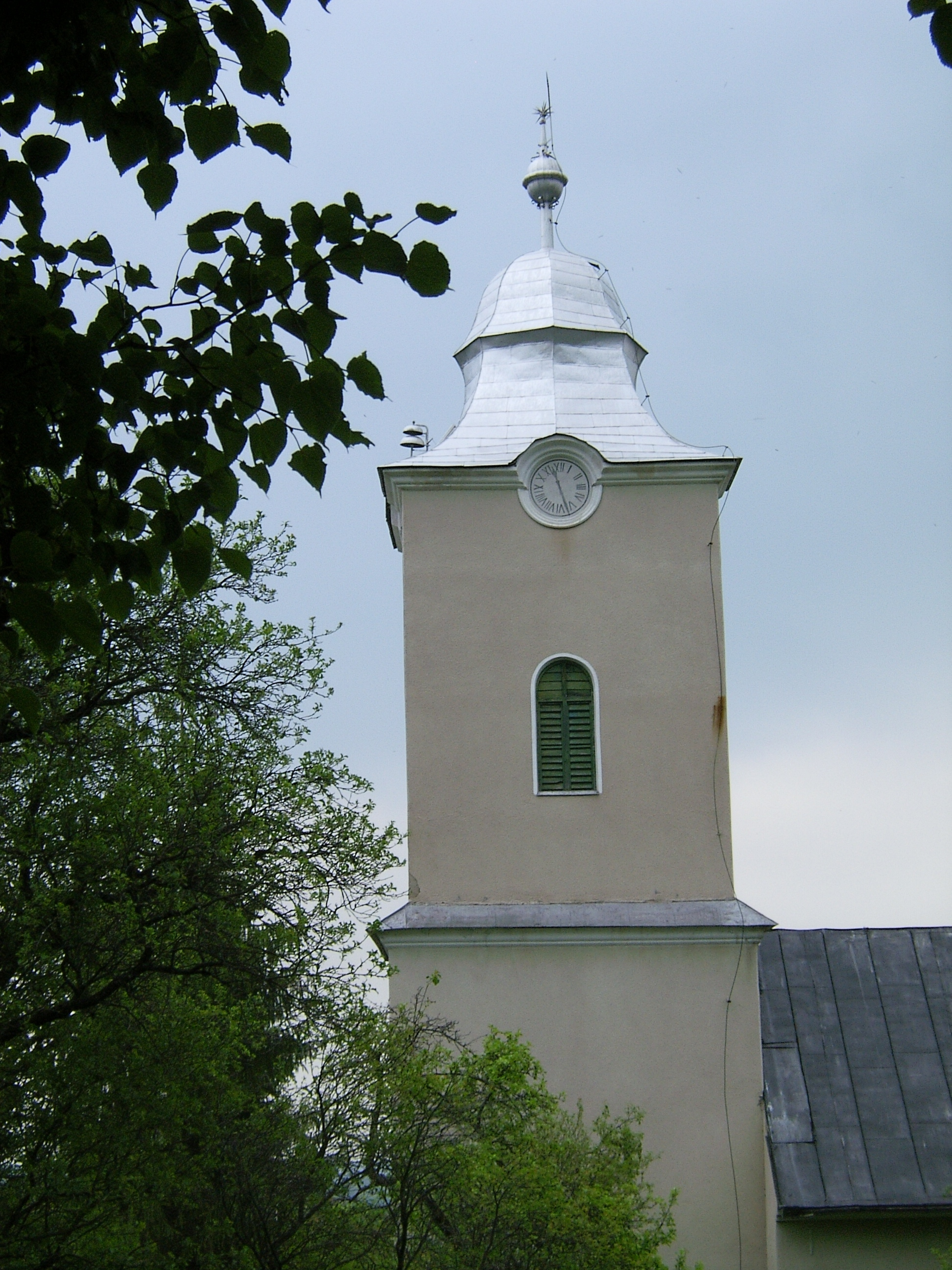 Magyarókereke református temploma (Erdély)